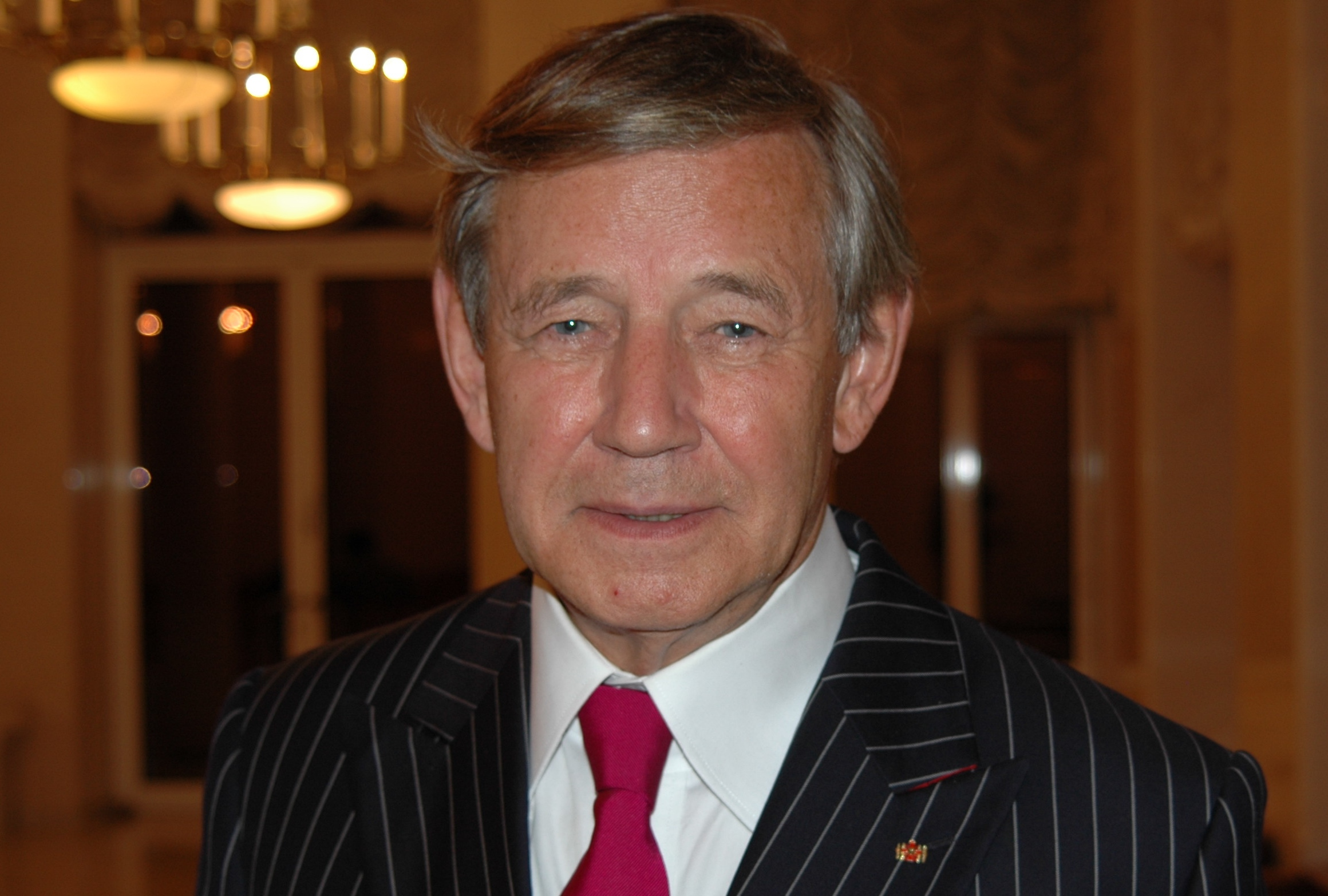 Frank Elbe bei einer Tagung der Carl Friedrich von Weizsäcker Stiftung im Generalkonsulat der Russischen Föderation in Bonn